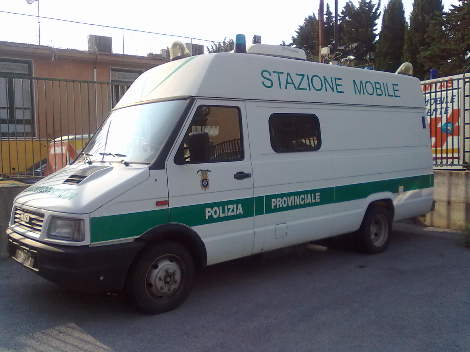 Stazione mobile della Polizia Provinciale di Salerno